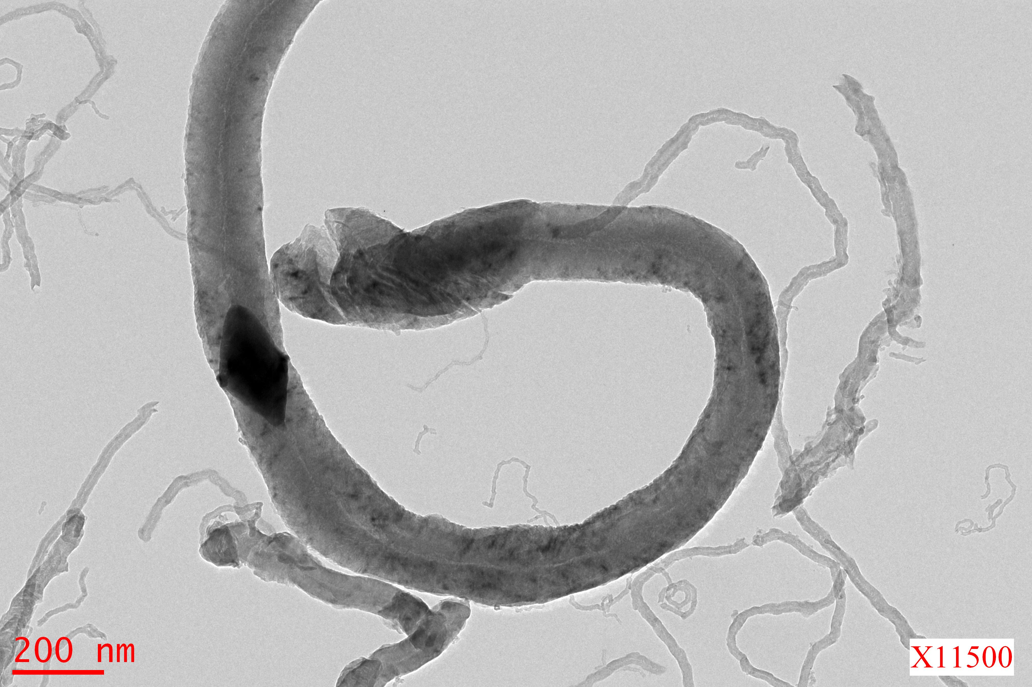 Particule de catalyseur en forme de bi-cône ayant permis la croissance d'une fibre de carbone à structure en arête de poisson (plateforme de microscopie électronique de l'Institut de Science des Matériaux de Mulhouse - UMR CNRS-UHA 7361)